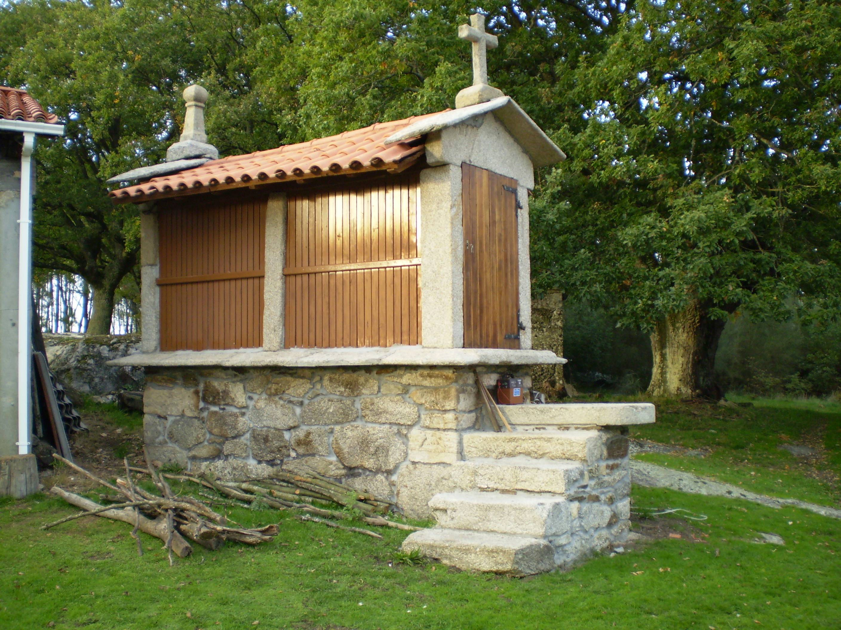 Hórreo de tipo mahía, de dous claros sobre soleira de mampostería. Porta penal con cuberta de tella do país e adornado con lampión e cruz latina, ambos elementos de altura un tanto máis reducida do habitual, conformando un conxunto moi harmónico coas dimensións do hórreo. Reacondicionado con bo xeito e respectando a idea orixinal da construción. Este hórreo está nun espazo de acceso totalmente privado. Ubicado no lugar da Laxe, parroquia de Barreiro (Antas de Ulla)